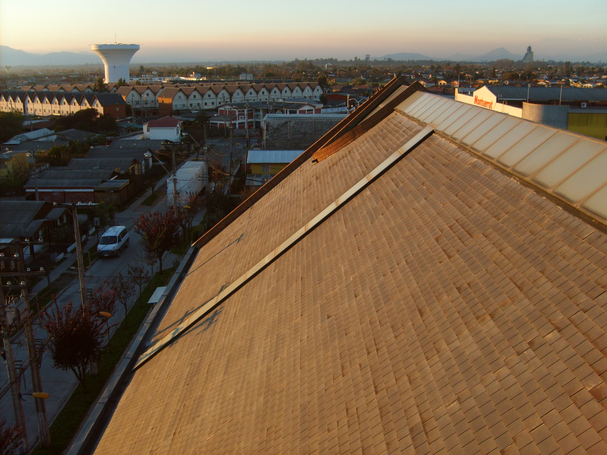 La villa Los Héroes (Maipú, Santiago de Chile) vista desde el campanario de la capilla Sagrada Familia. Al fondo se divisa el Templo Votivo de Maipú, un estanque de agua de SMAPA y parte del supermercado Montserrat.